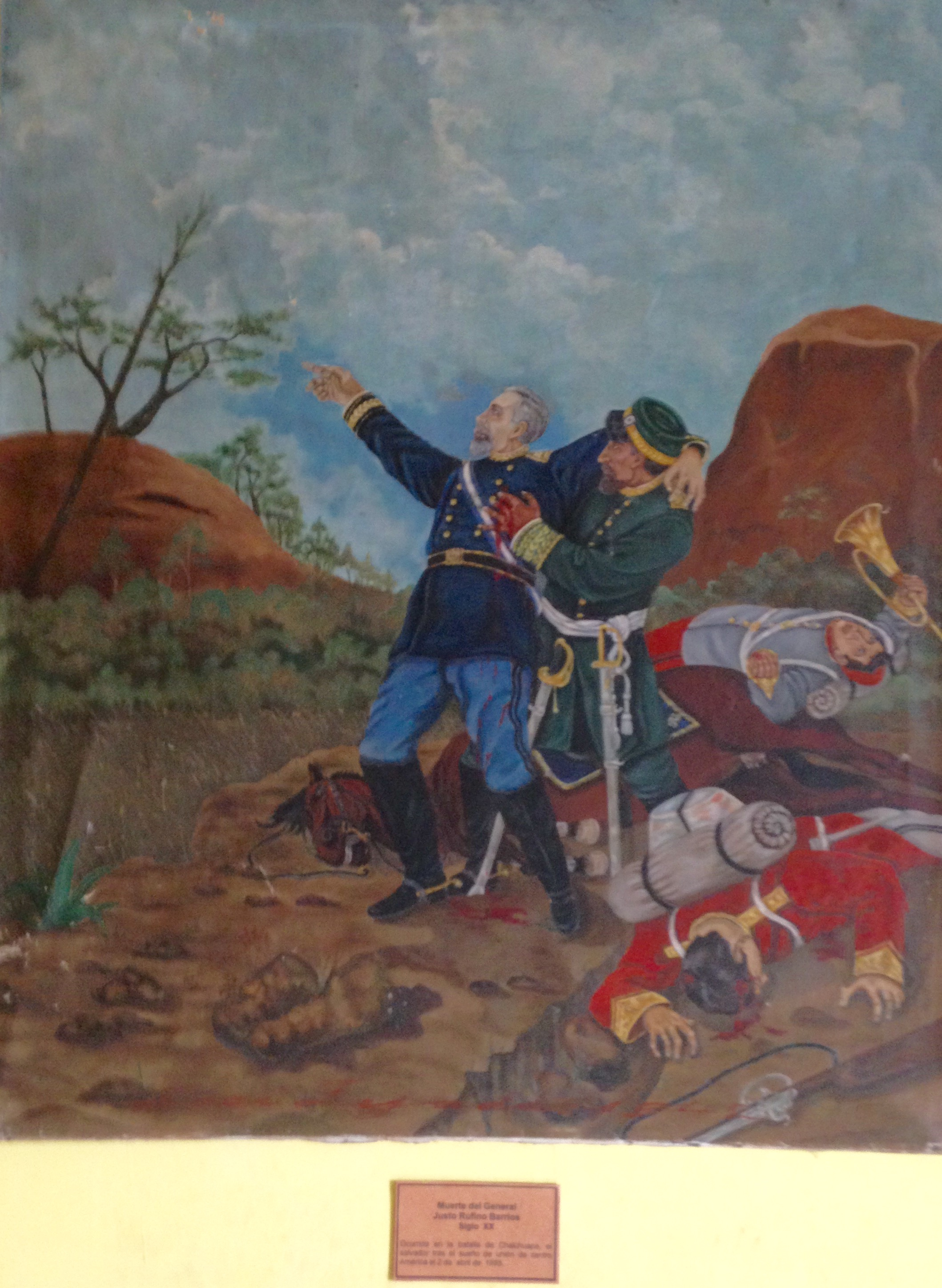 Idealización de la muerte del general Barrios. Colección del Museo Nacional de Historia de Guatemala.